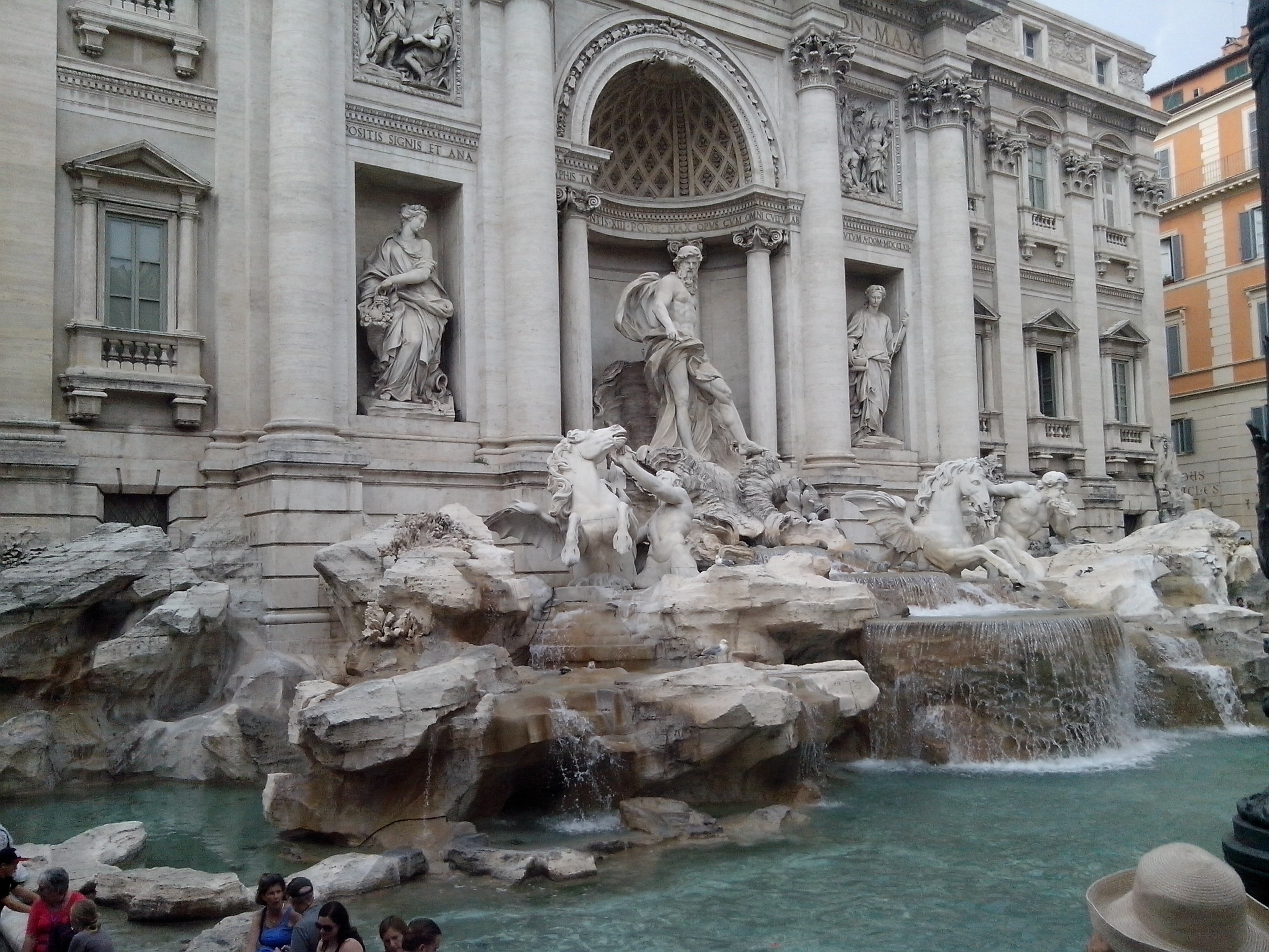 La fontana che oggi ammiriamo fu iniziata per volere del papa Clemente XII, nel 1732, dopo che nell'area, a partire dal 1640, si erano intrapresi lavori di restauro fermatisi, però, a un basamento a esedra, realizzato da Gian Lorenzo Bernini. Nello stesso tempo la famiglia Poli, proprietaria degli edifici retrostanti, aveva edificato i due prospetti simmetrici che avrebbero poi fatto da sfondo alla splendida scenografia della fontana.